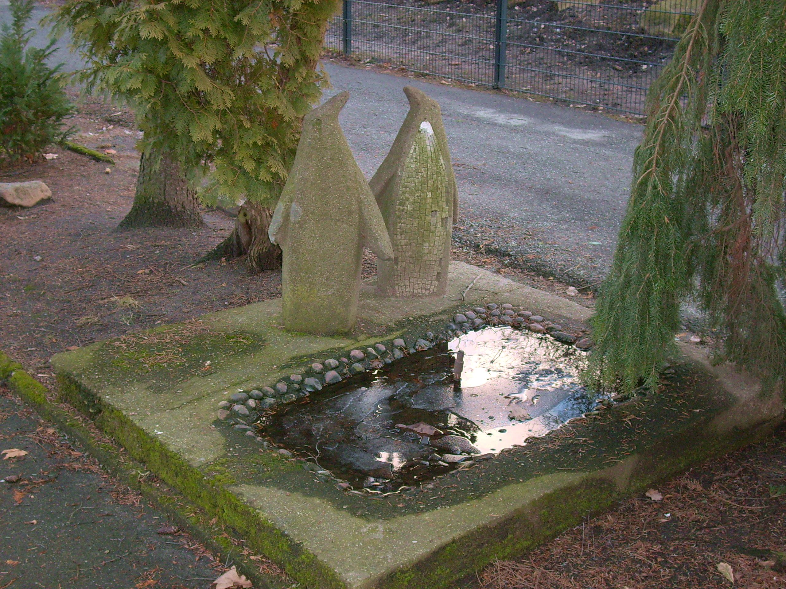 Betonplastik „Pinguine“ von Helmut Heinze im Zoo Hoyerswerda